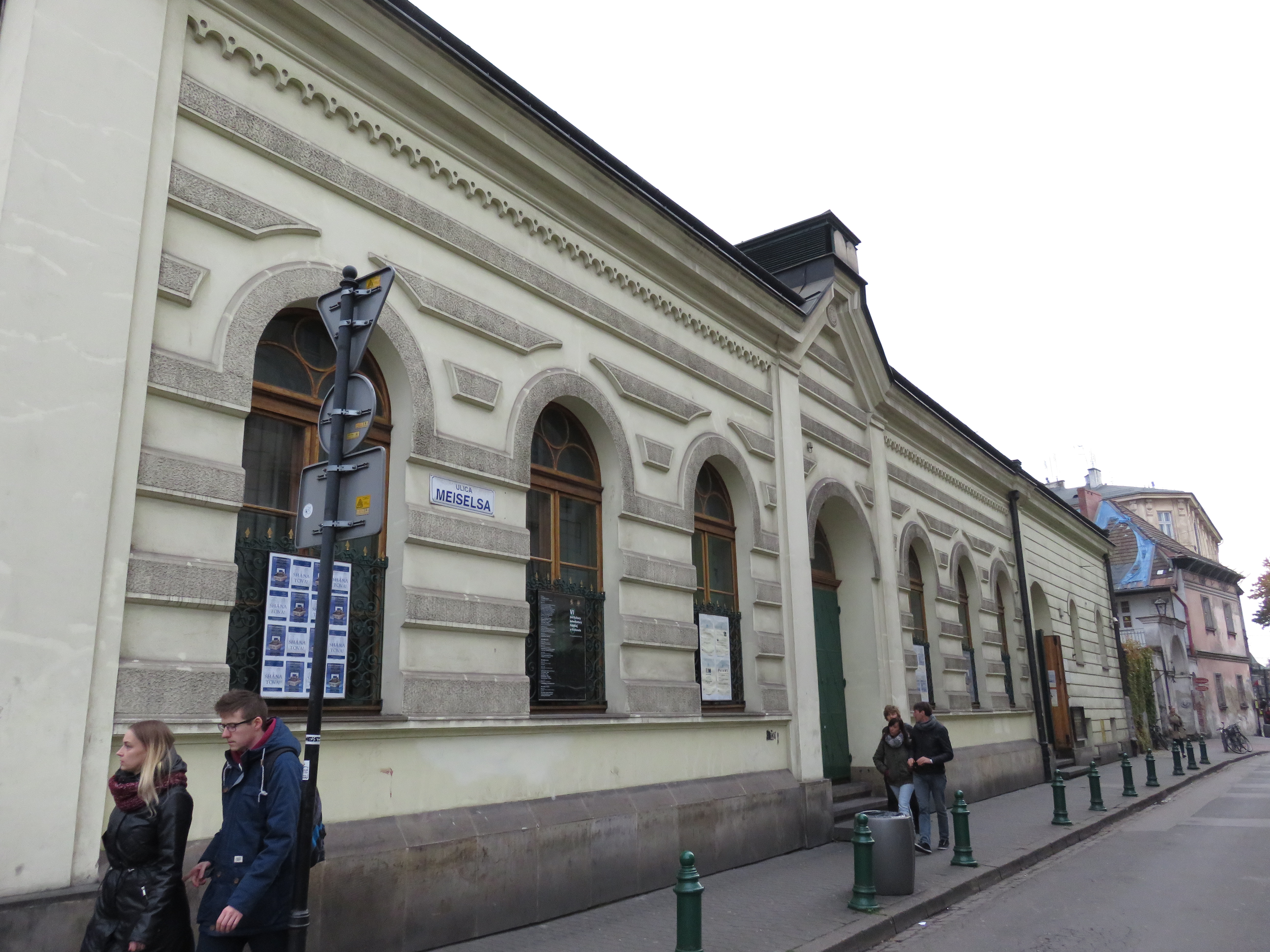 רחוב מייזלס, קרקוב (2).jpg